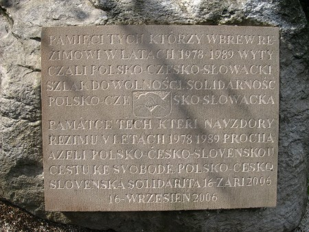 Tablica upamiętniająca spotkania opozycjonistów polsko - czesko - słowackich mających miejsce w latach 1978 - 1989.